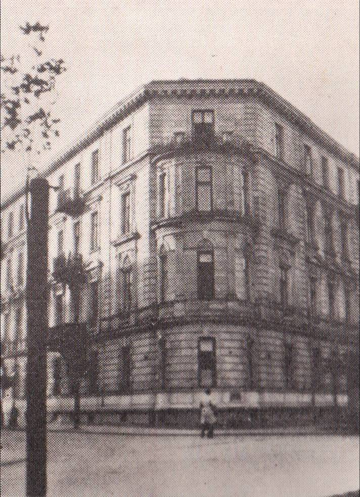 Budynek szkoły Jadwigi Kowalczykówny i Jadwigi Jawurkówny przy ul. Wiejskiej 5 w Warszawie (ca. 1930)